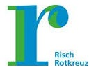 Logo der Gemeinde Risch gem. ihrer eigenen Webseite (Stand Februar 2016).